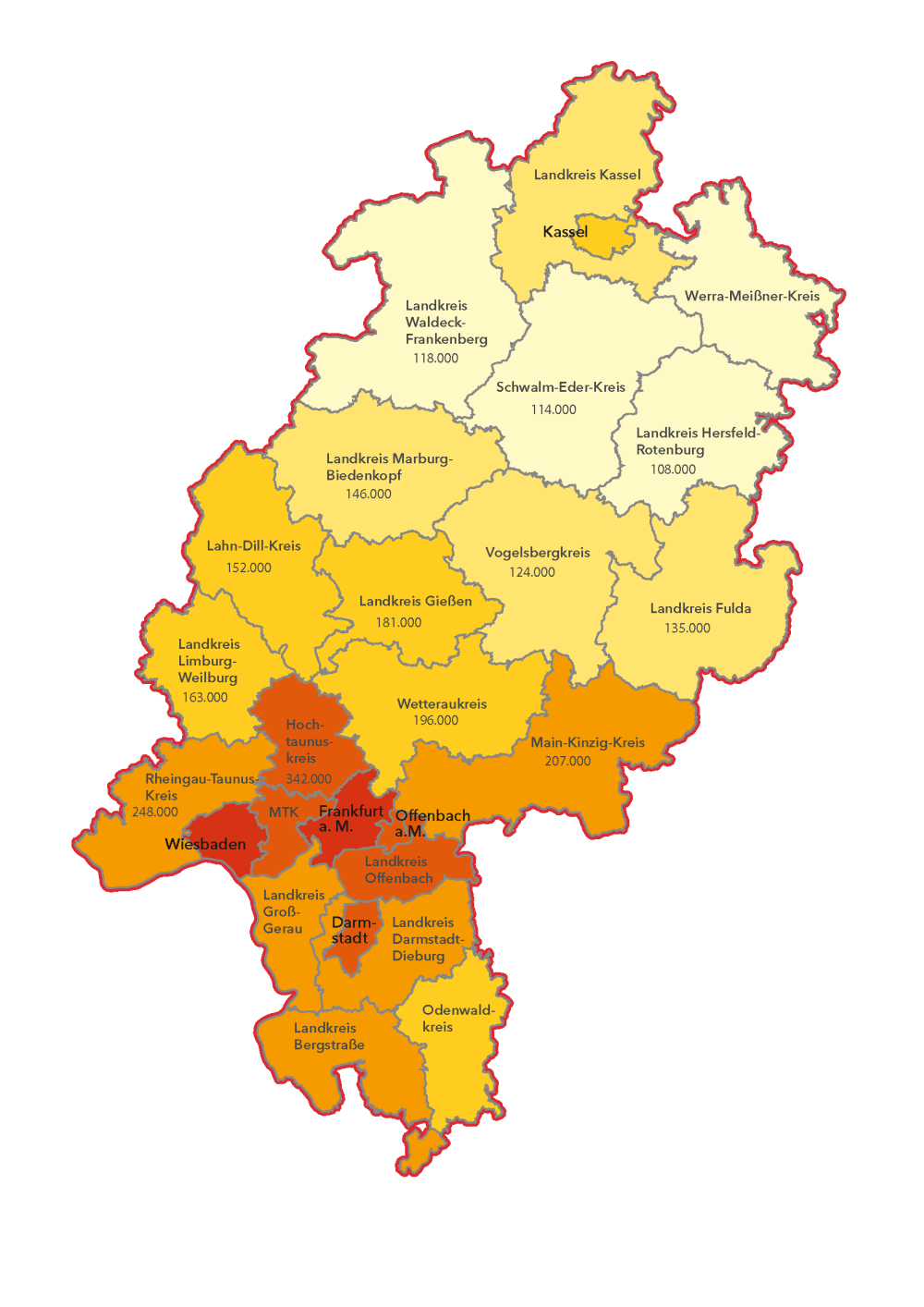 Immobilienwertermittlung in den hessischen Landkreisen